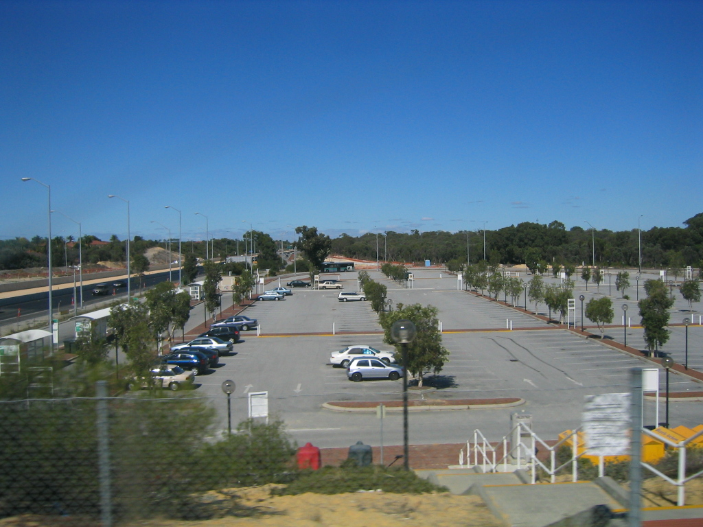 Transperth Murdoch Park 'n' Ride